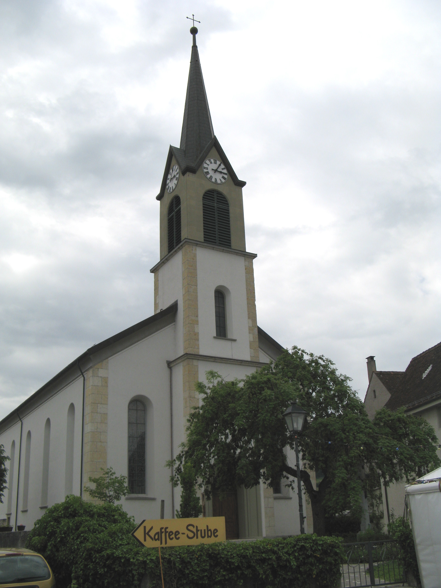 Katholische Kirche im solothurnischen Teil von Erlinsbach